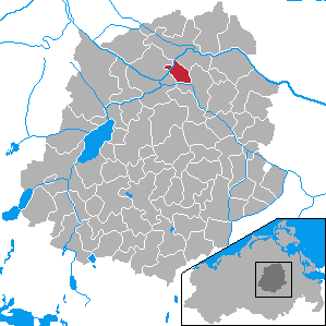 Kletzin, Landkreis Demmin, Mecklenburg-Vorpommern